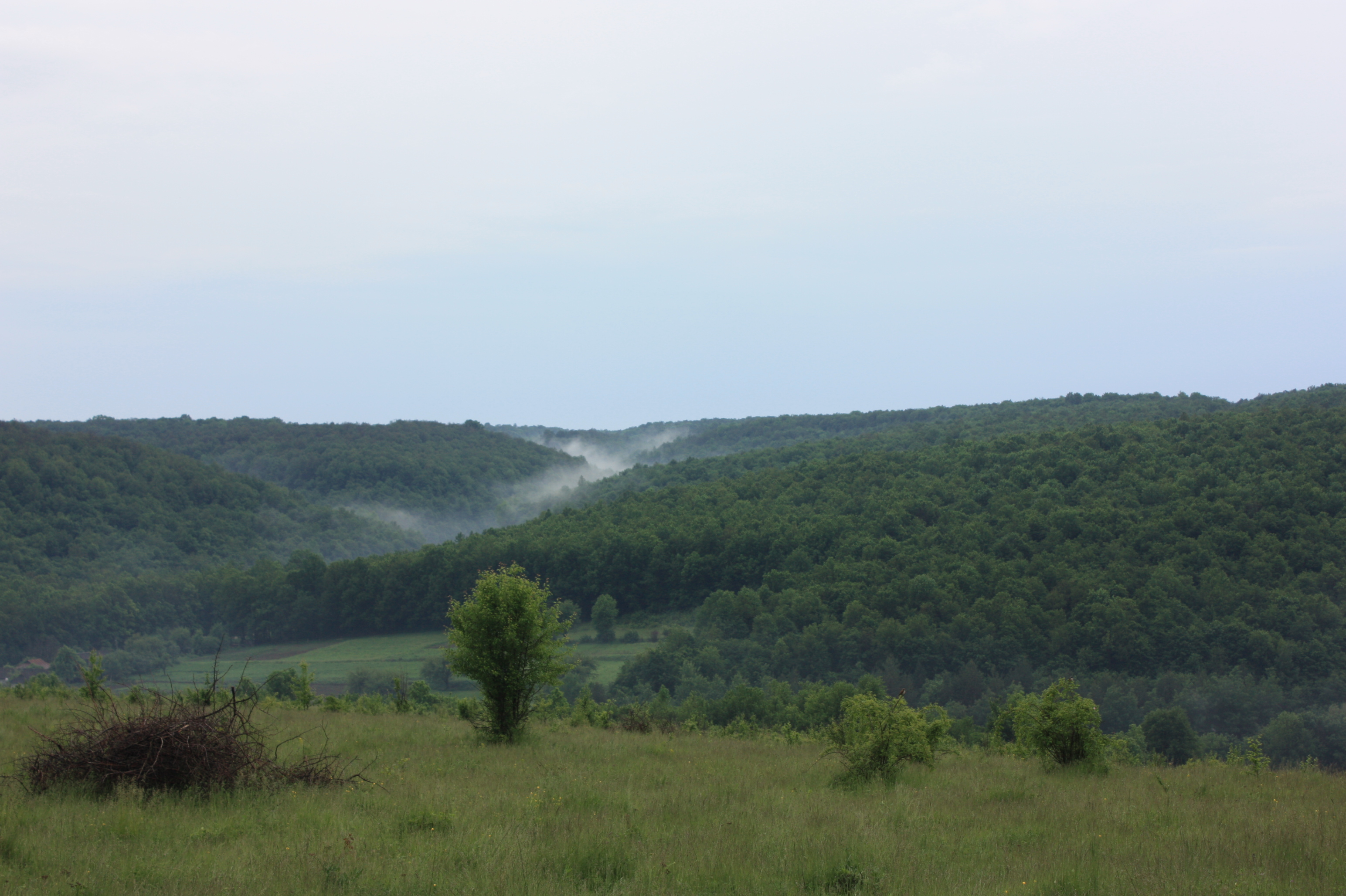 «Кармелюкове Поділля», Чечельницький район Бондурівська, Бритавська, Вербська, Демівська, Куренівська, Любомирська, Лузька, Стратіївська, Тартацька, Червоногреблянська сільські ради Чечельницької селищної ради Чечельницького району Тростянецький район с. Торканівка